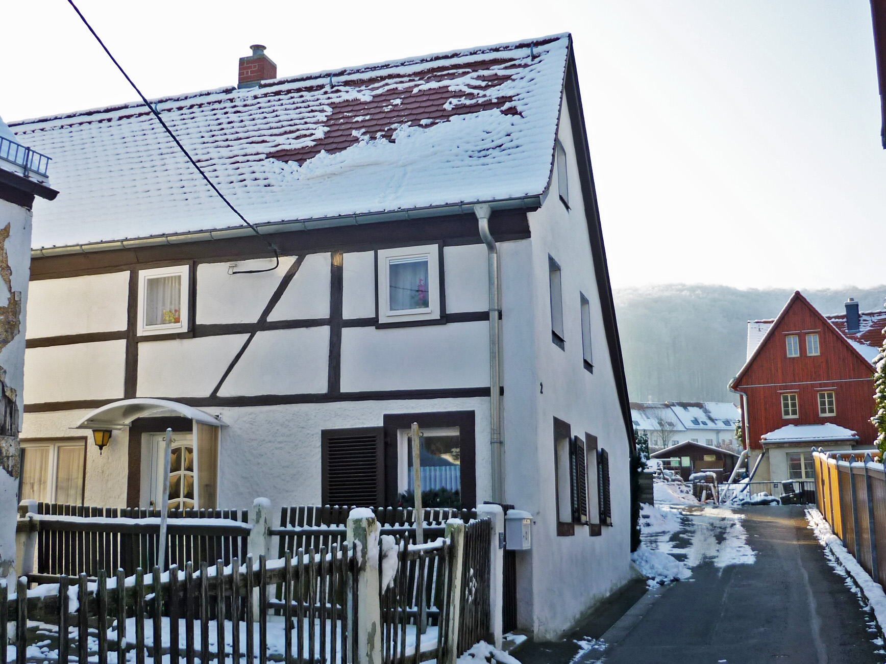 Freital-Burgk, Am Schlossgarten 2